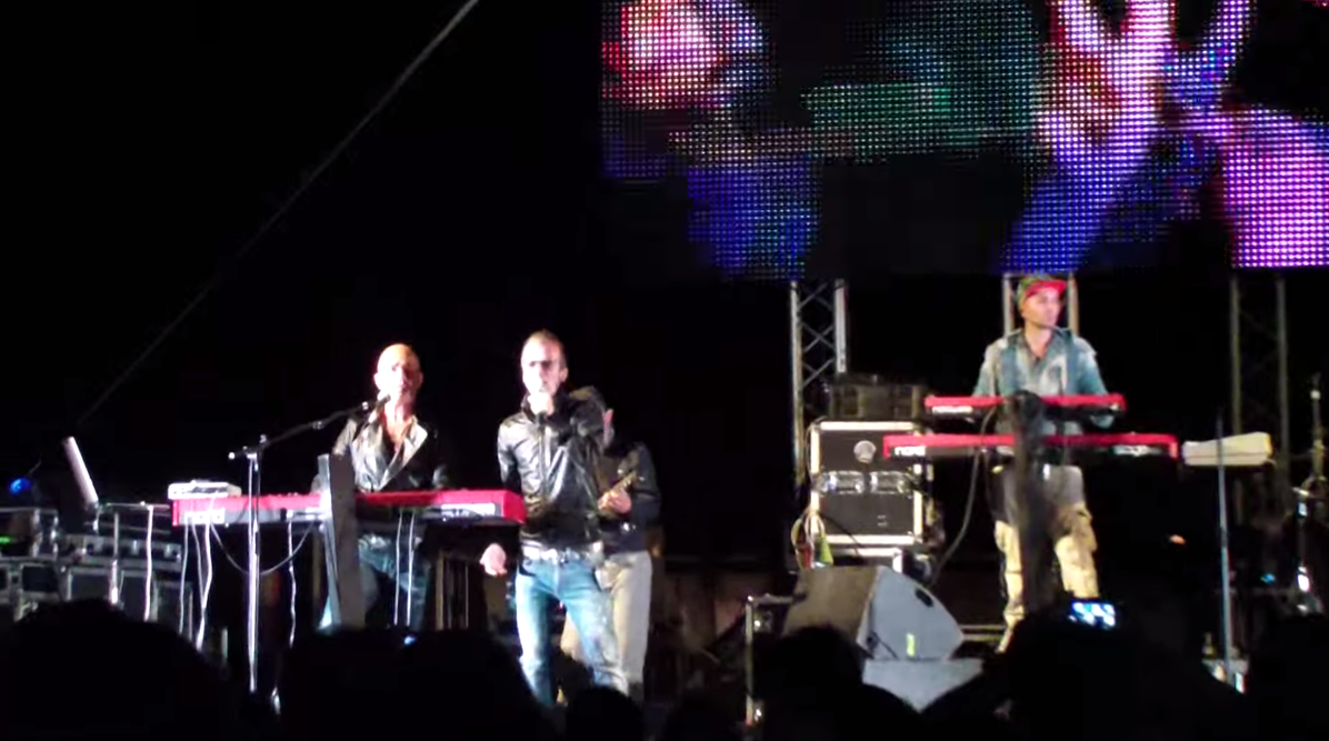 Il gruppo musicale sardo Tazenda in concerto ad Arbus nell'agosto 2014.